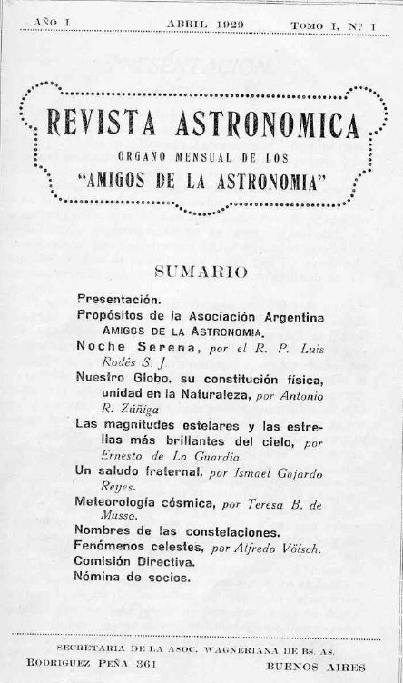 Portada de la primera revista de 1929 de la Asociacion Argentina de Amigos de la Astronomia.